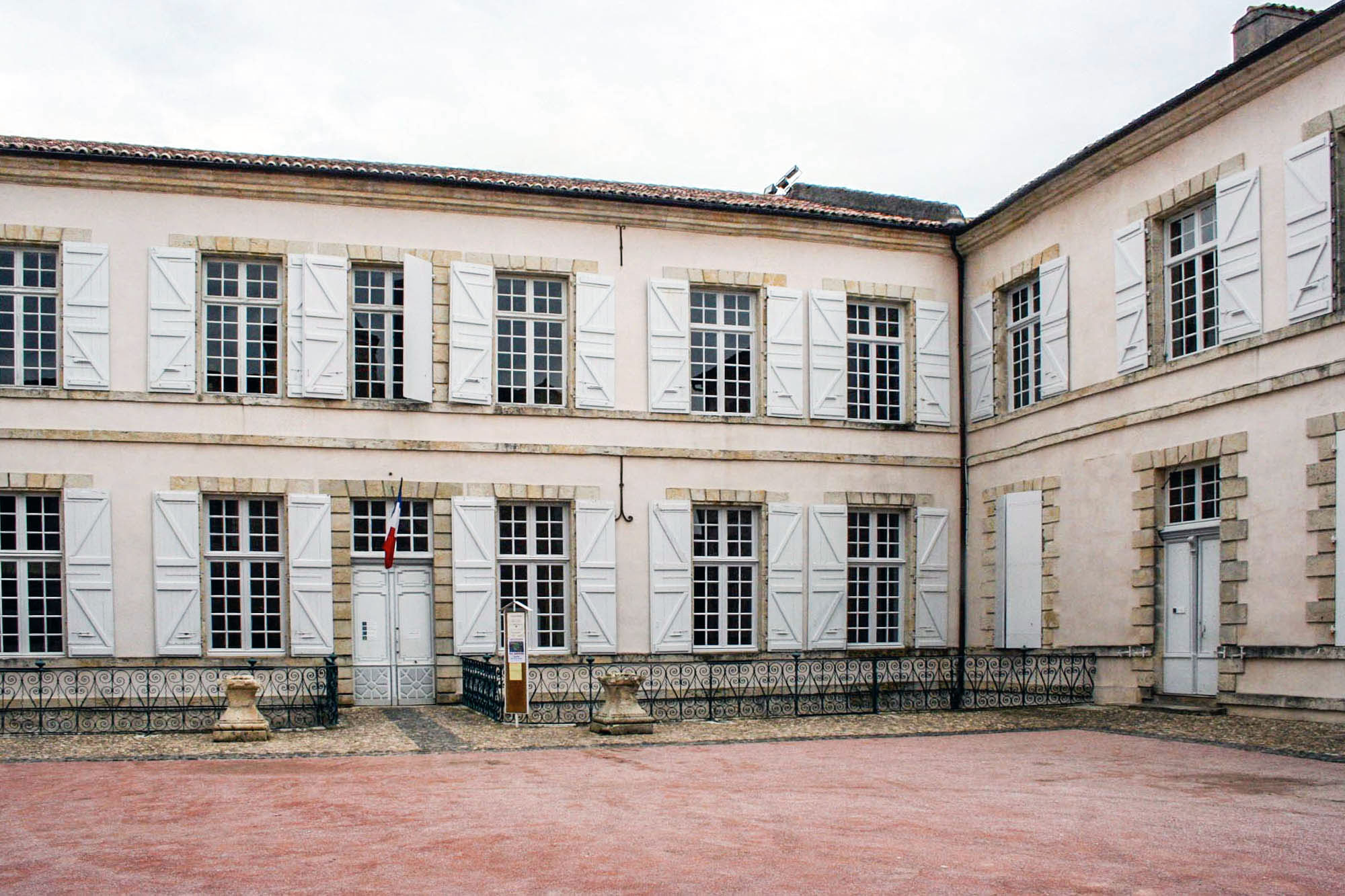 Hôtel de ville de Lectoure (Gers, Midi-Pyrénées, France), ancien évêché, ancienne demeure du maréchal Lannes.